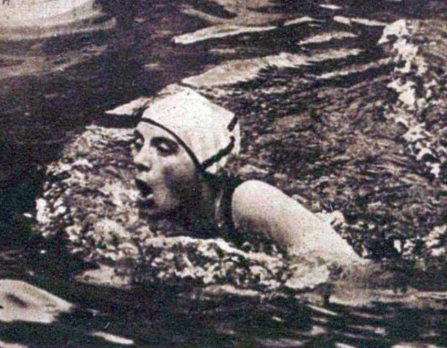 Lucy Morton, championne olympique du 200 mètres brasse aux JO de 1924.